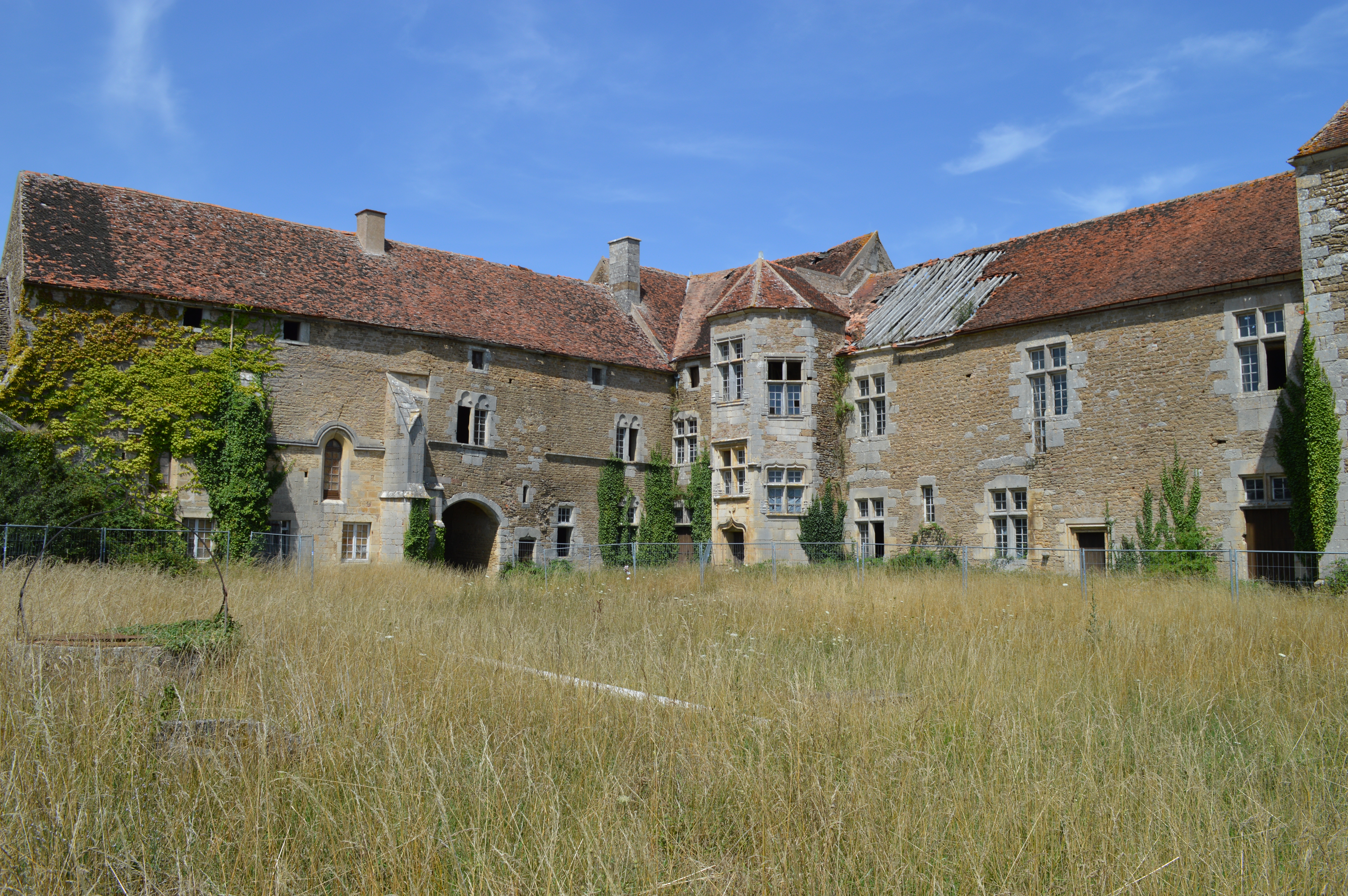 Prise de vue de l'angle nord-est côté cour intérieure du château de PiSy.